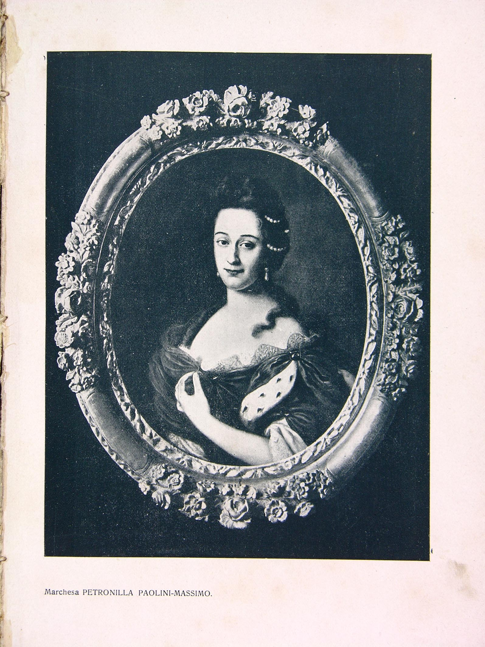 Petronilla Paolini Massimi (1663-1726)